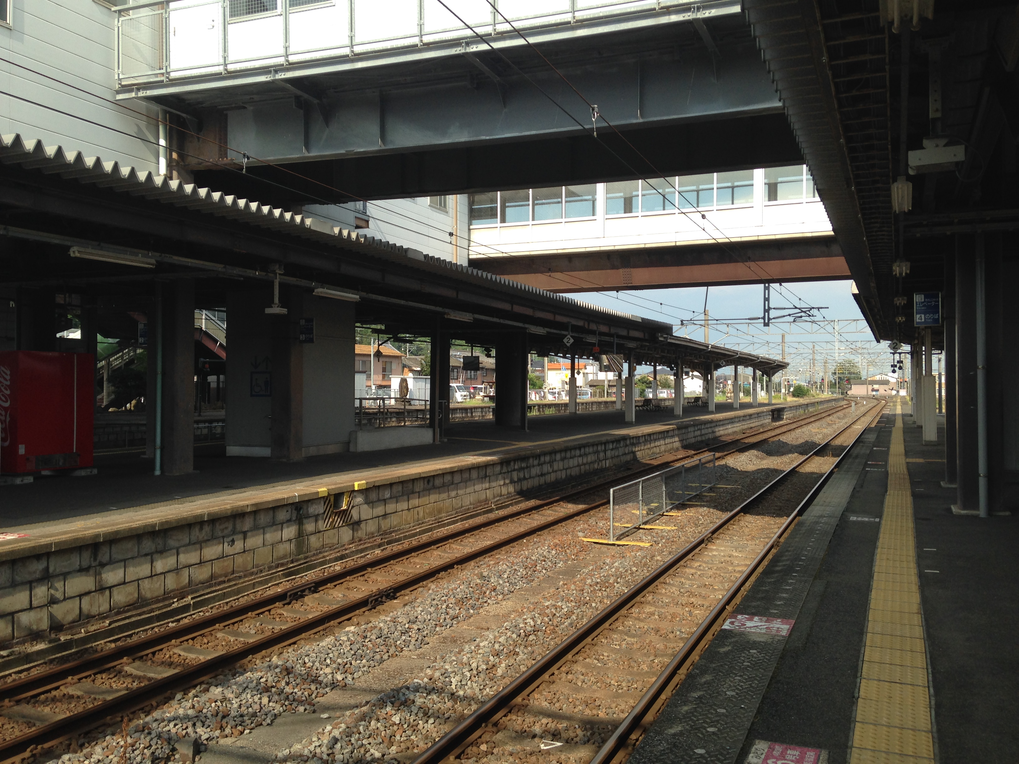 肥前山口駅のホーム(奥は牛津方面)